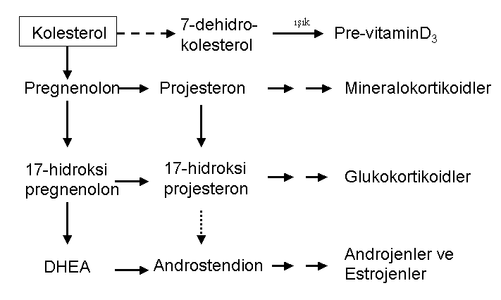 Kolesterolden üretilen bazı bileşikler.